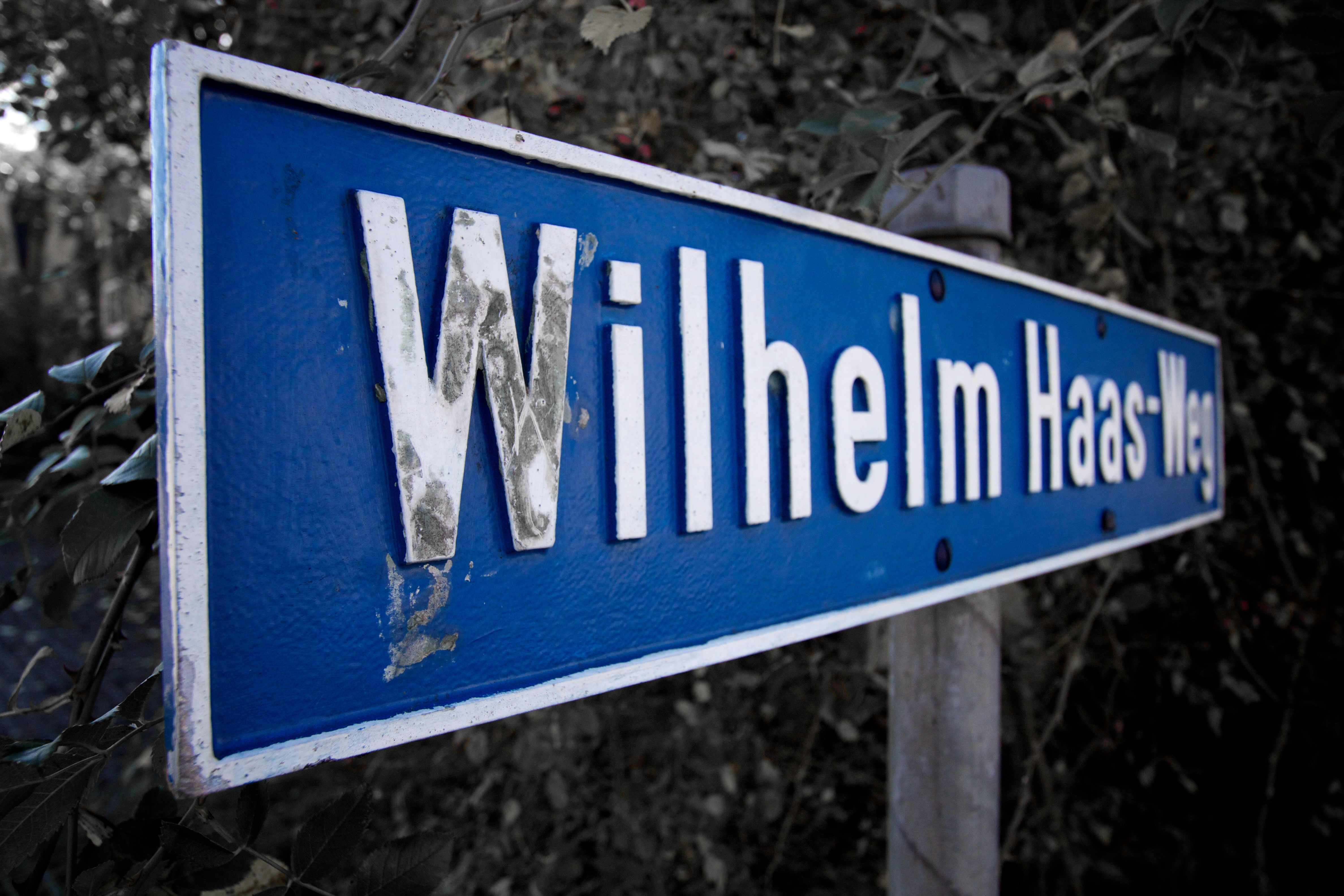 Wilhelm Haas Weg in Munchenstein, Switzerland